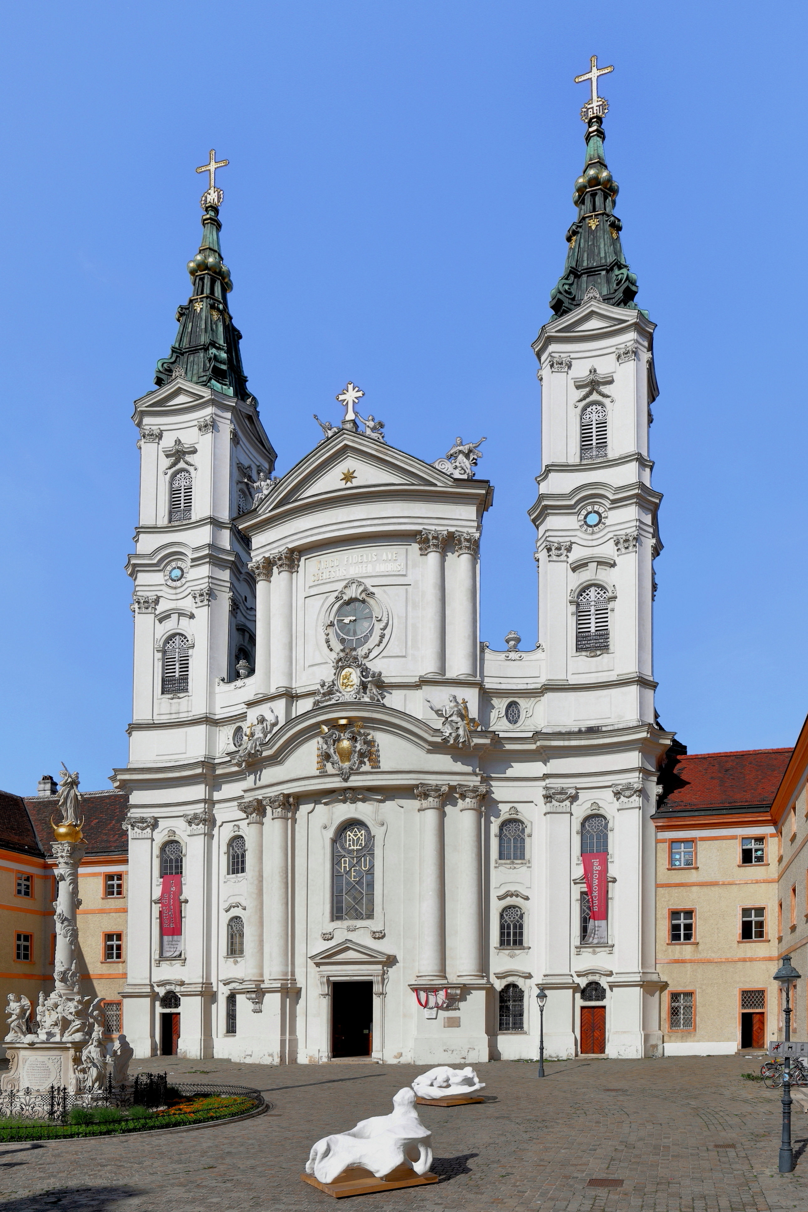 Die Piaristenkirche Maria Treu am Jodok-Fink-Platz im 8. Wiener Gemeindebezirk Josefstadt. Links davor die 1713 gestiftete Mariensäule und rechts 2 Skulpturen, die riesengroße Halswirbel darstellen und von der Künstlerin Sylvia Kummer stammen.Die Baugeschichte der Kirche ist mangels archivalischer Unterlagen gering dokumentiert. Von 1716 bis 1721 dürfte nach Entwürfen von Johann Lucas von Hildebrandt der Rohbau errichtet worden sein. In einer 2. Bauphase dürfte dann bis 1756 der Innenausbau und die Innenausstattung fertiggestellt gewesen sein.